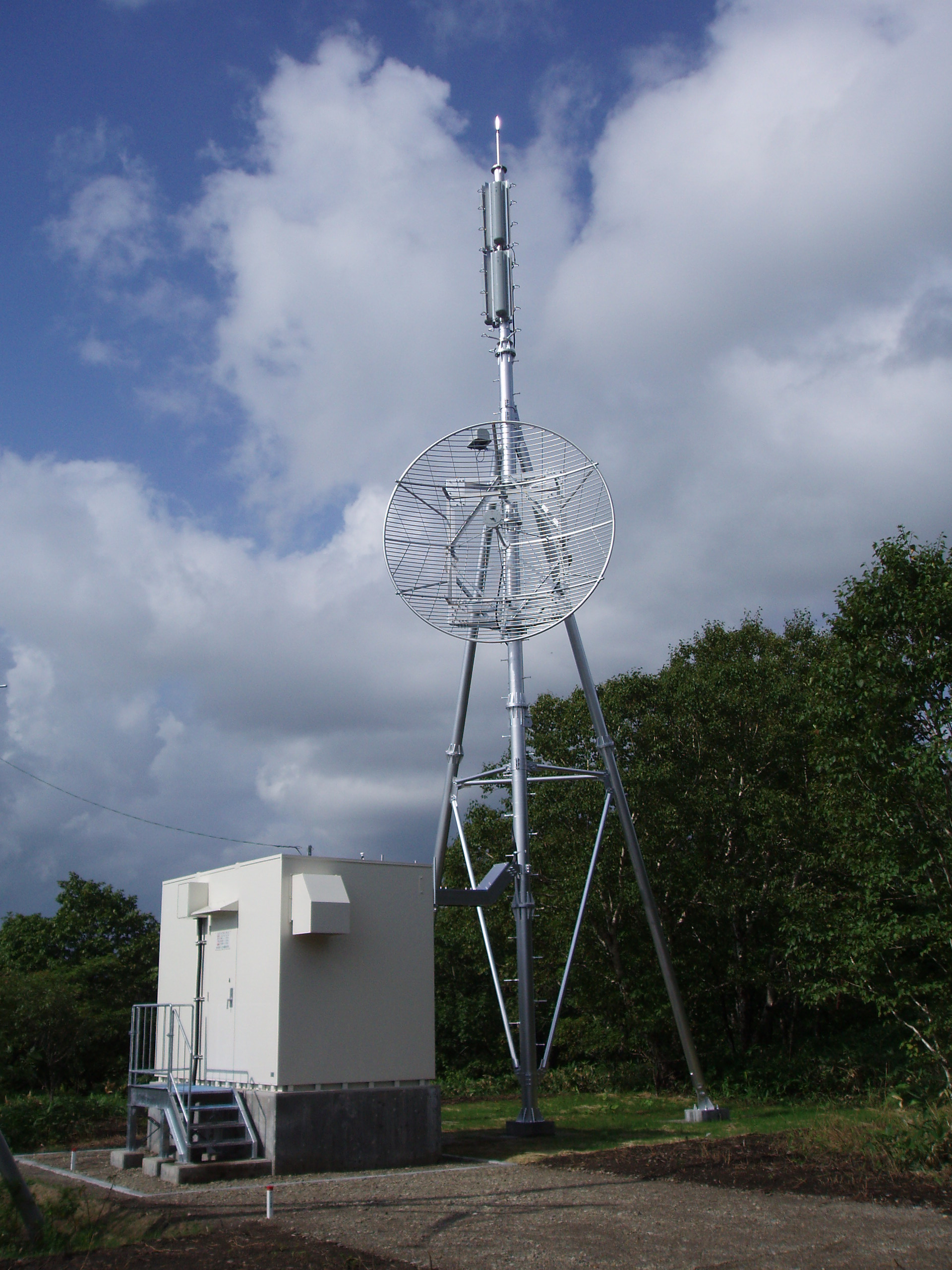 弟子屈中継局（デジタル） アナログUHF送信設備併設